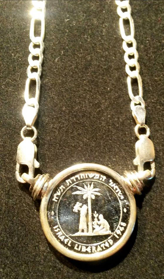 מדליית שחרור דור ג' - עדיליון כסף